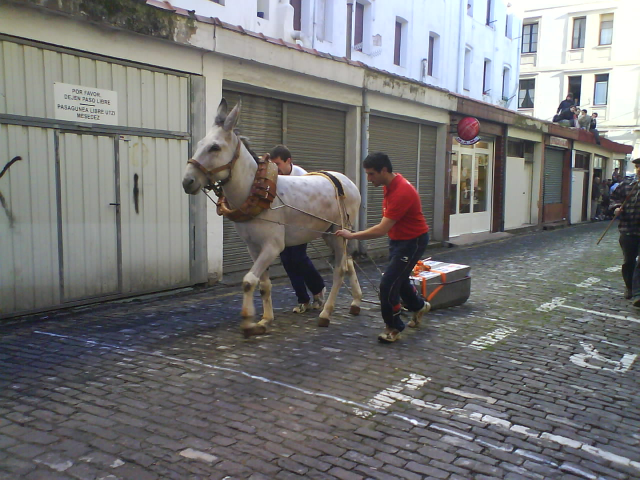 Asto proba Istingorra kalean